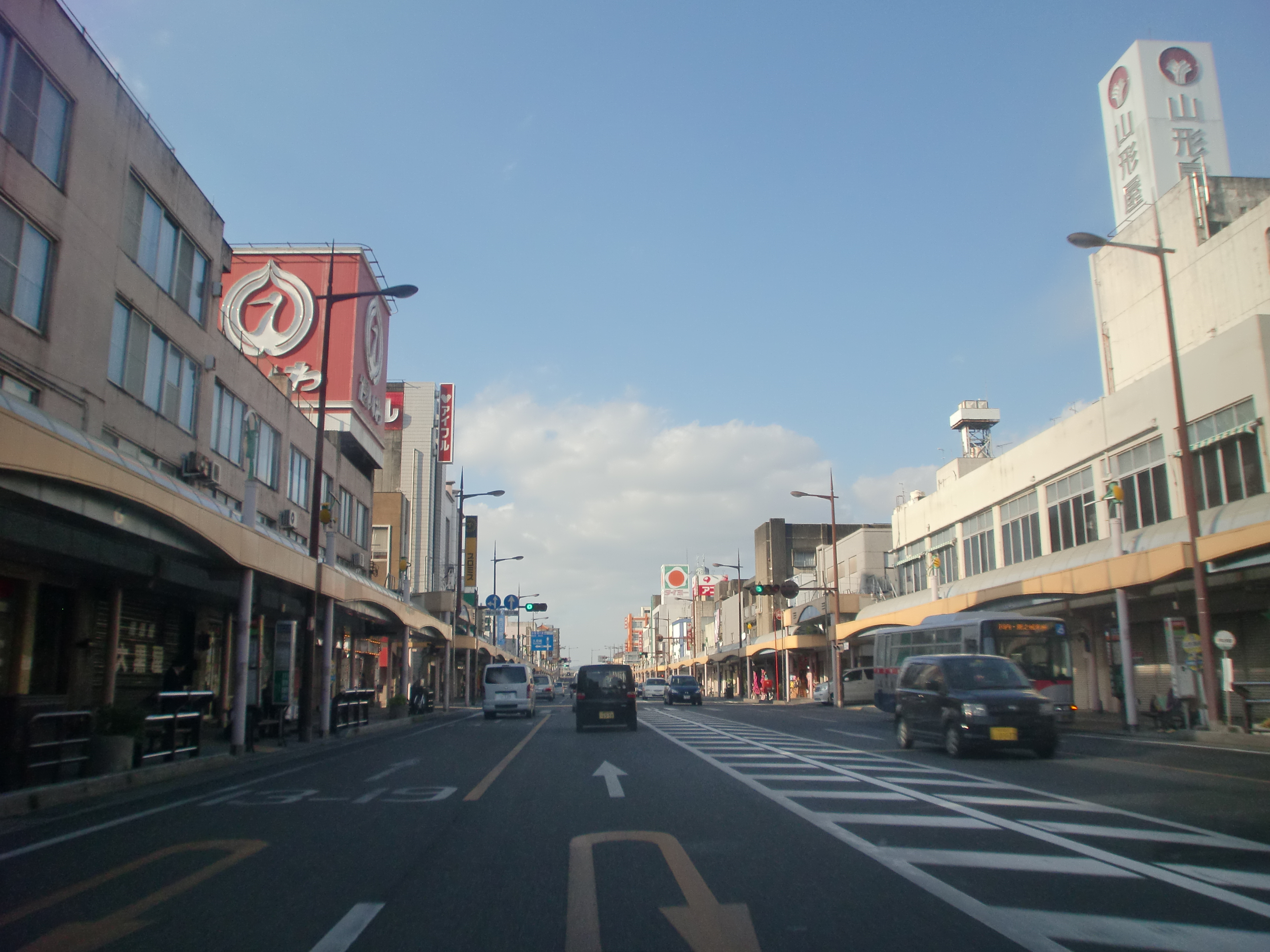 薩摩川内市の中心市街地を通る国道3号。